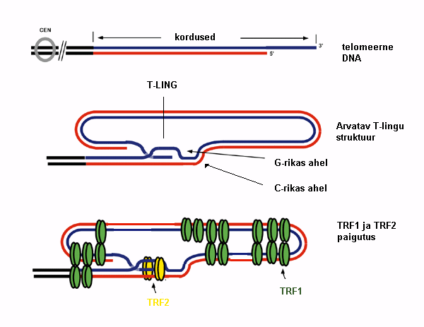 Joonis T-lingust